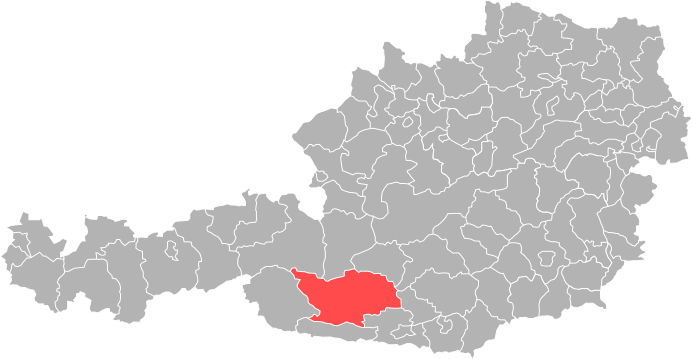 Bezirk Spittal an der Drau in Österreich